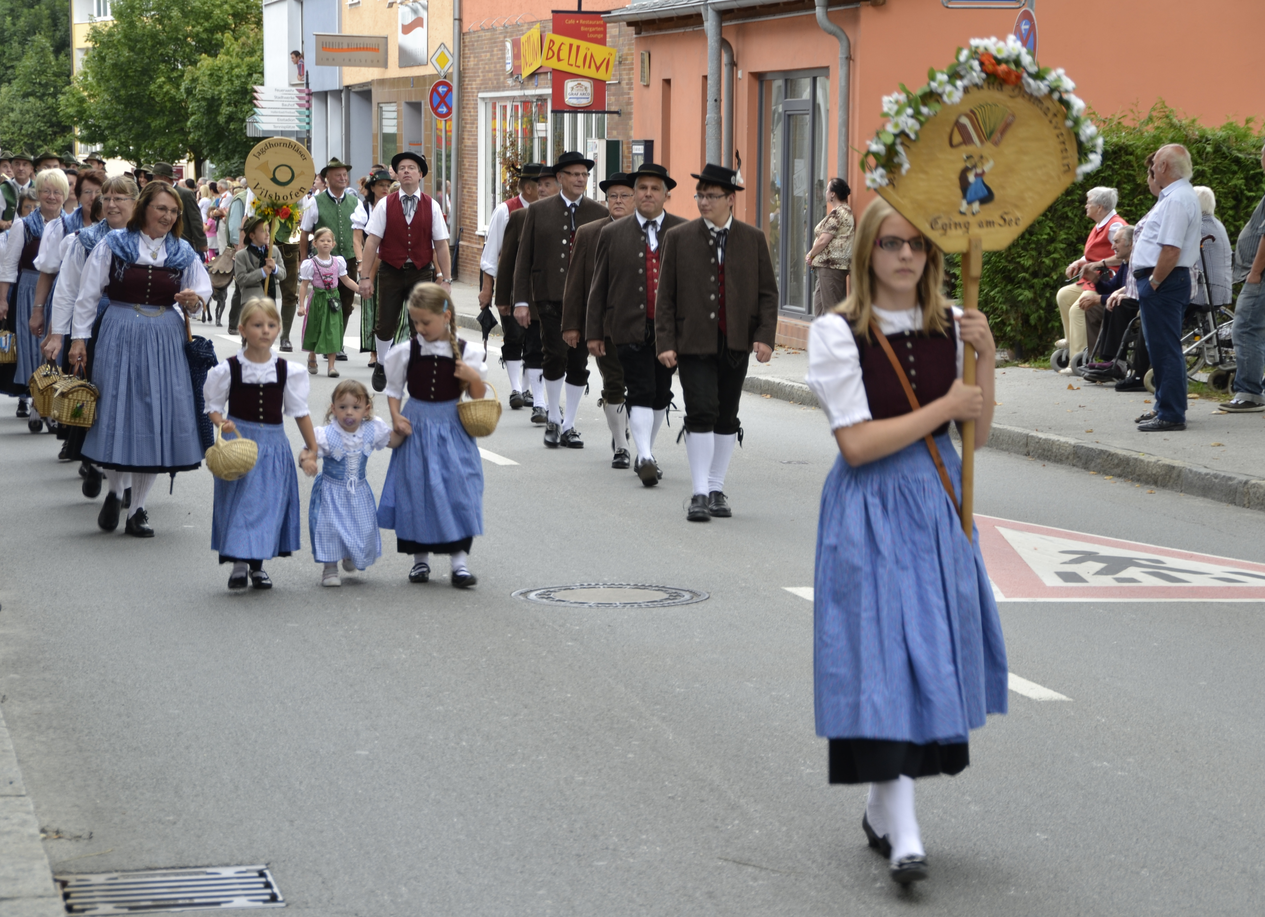 Der Volksfestumzug 2012 in Vilshofen an der Donau.